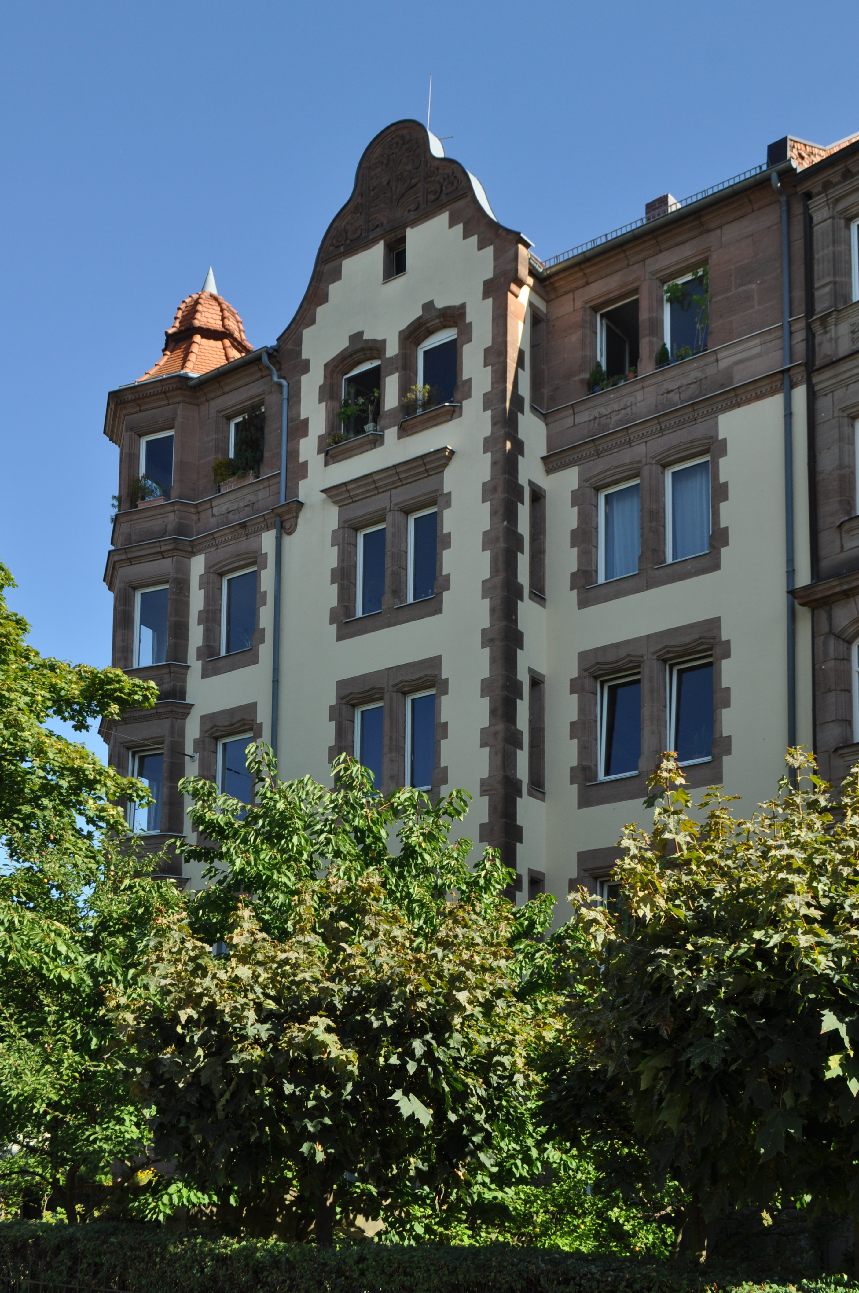 Mietshaus Adamstraße 45/Rennweg 72 (Nürnberg-Rennweg), Blick vom Rennweg.